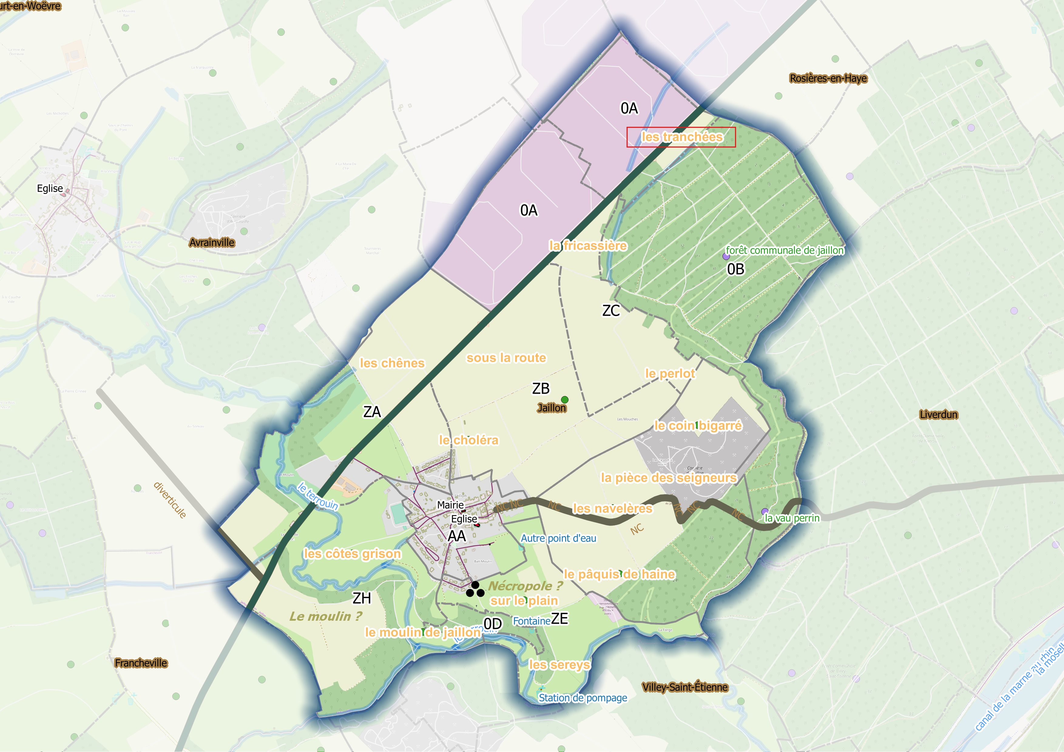 Fig1 - Jaillon (Ban communal)